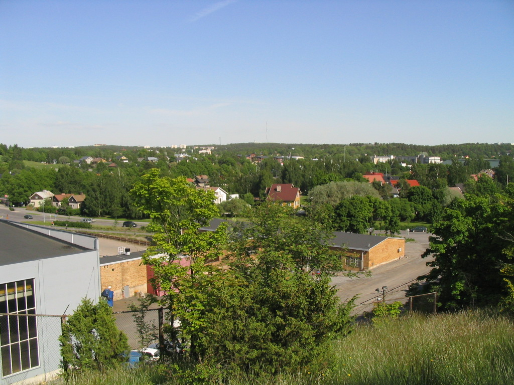 Näkymä Korppolaismäen huipulta Vähäheikkilään päin. 14.6.2005.